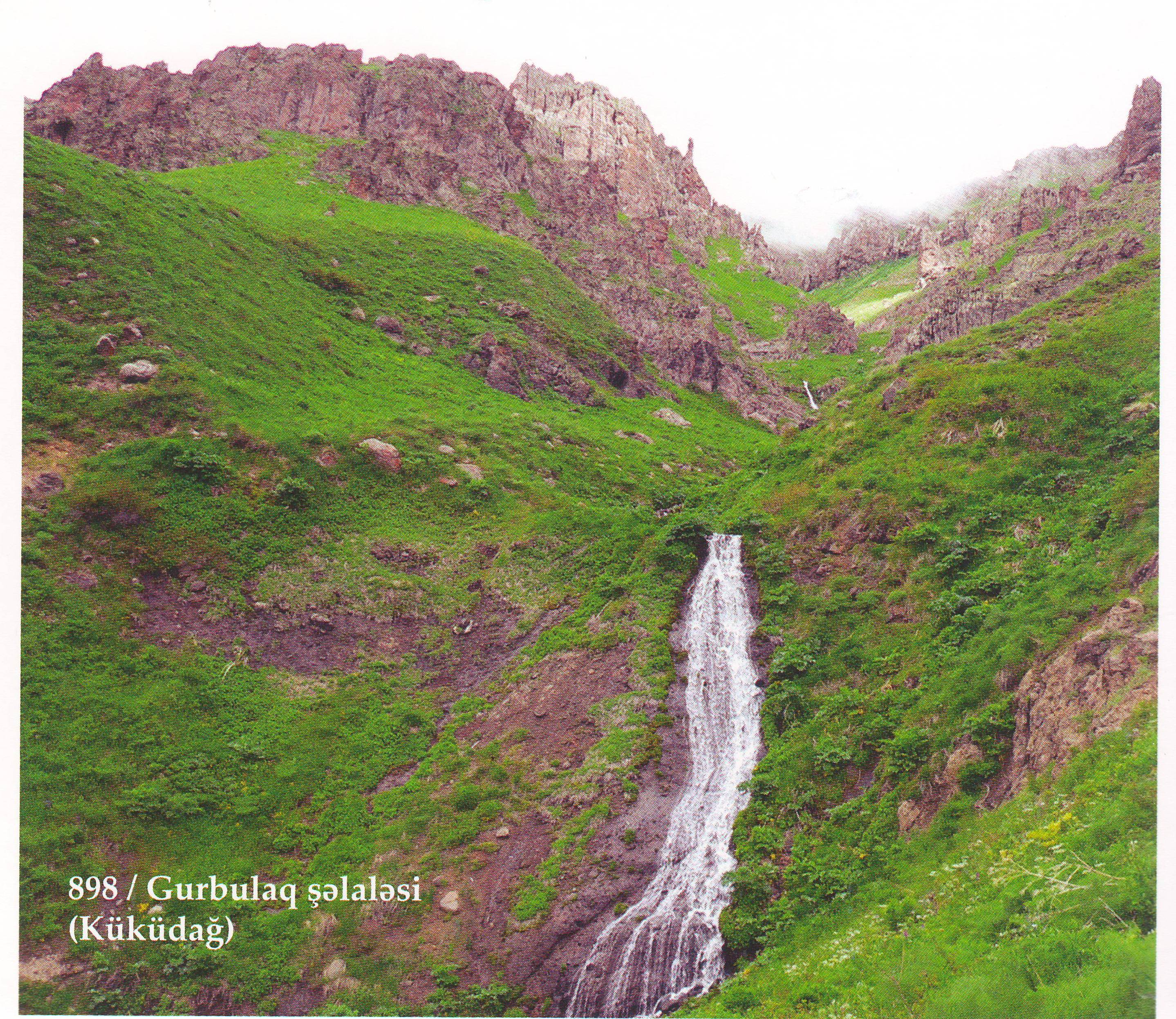 Şahbuz rayonu Gurbulaq şəlaləsi